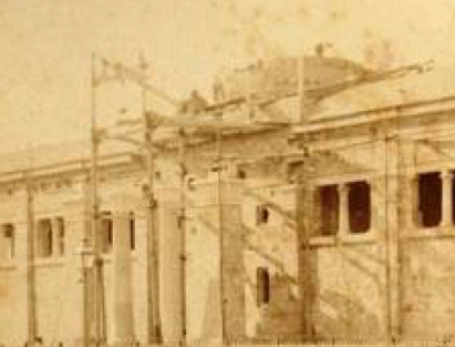 Biblioteca Museu Víctor Balaguer- Construcció edifici